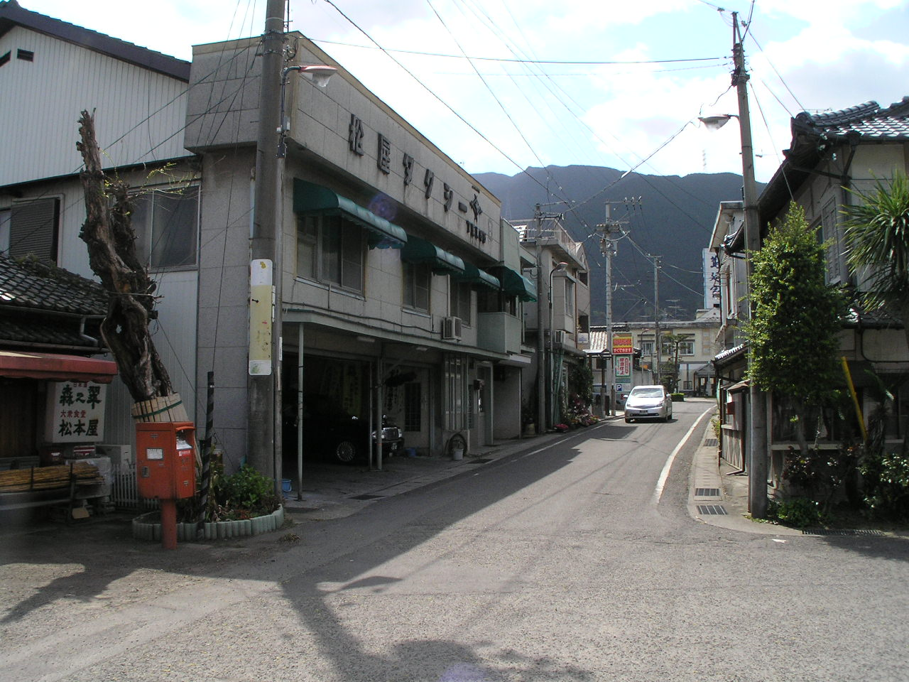 予讃線土居駅 ～photo by Autumn Snake 【おぉたむ すねィく投資部門】広報担当 大西輝明